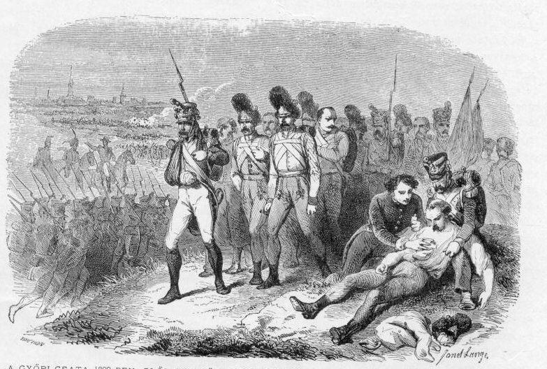 A győri csata 1809. június 14-én. Janet Lange fametszete